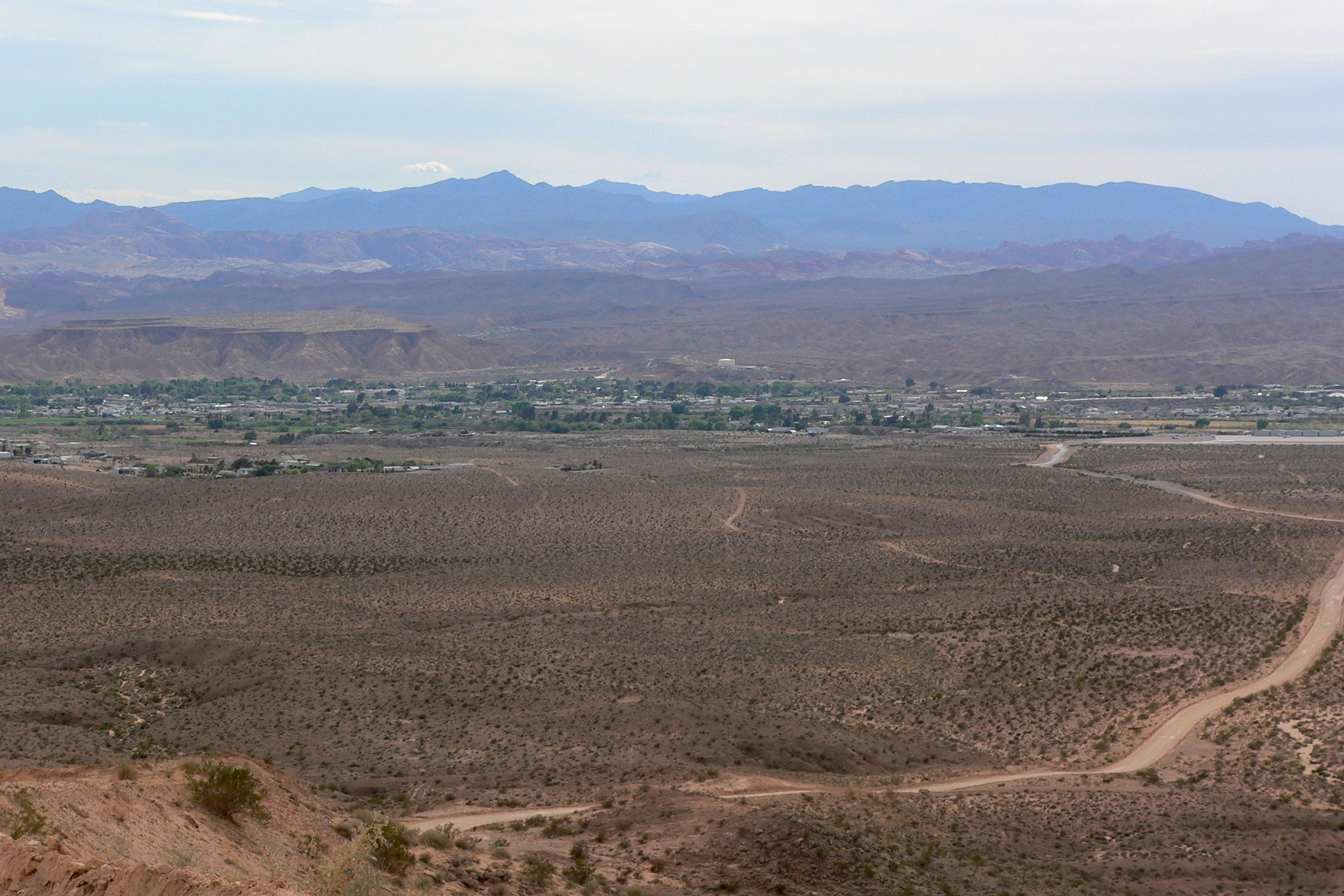 Overton, Nevada from Mormon Mesa